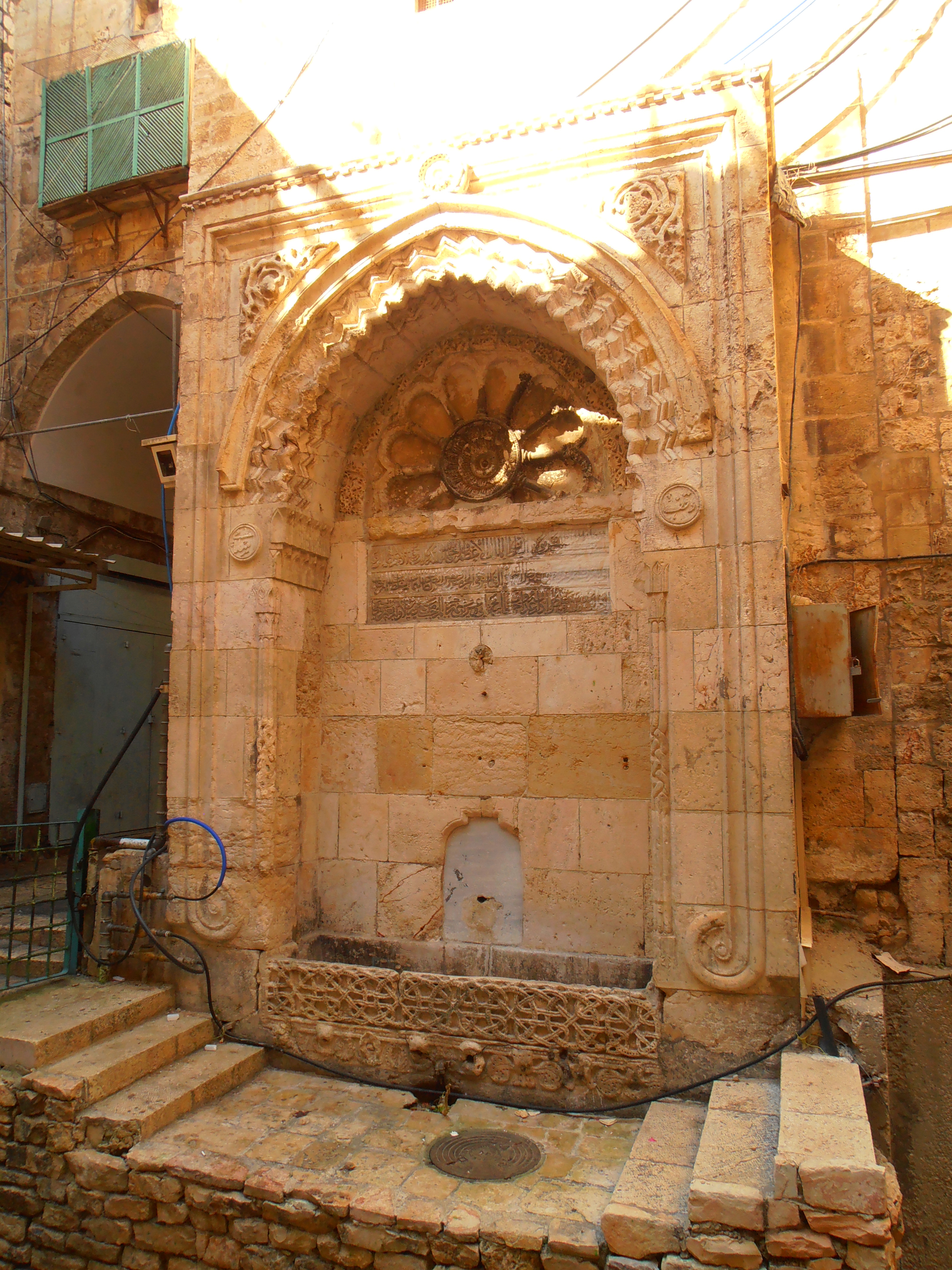 Chain Fountain; East Jerusalem רהט השלשלת; ירושלים